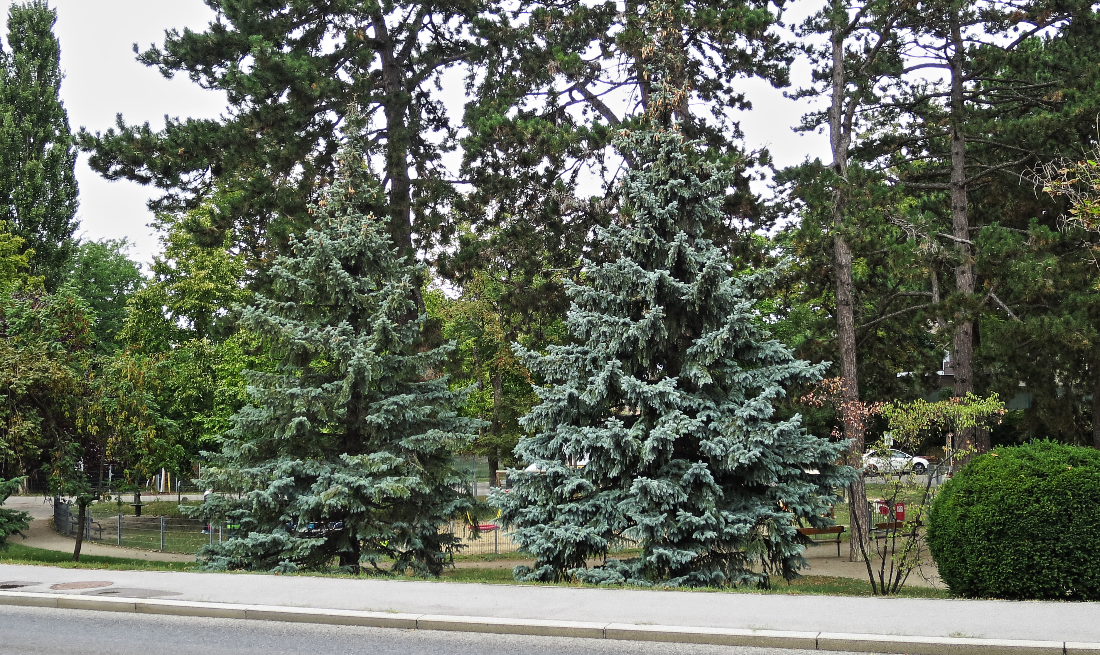 Wien-Donaustadt, Astrid-Lindgren-Park, Engelmann-Fichten